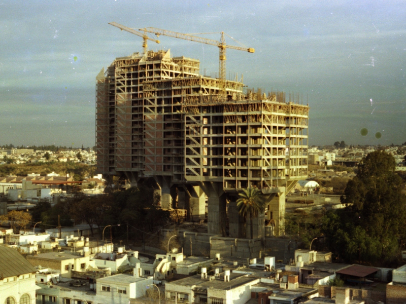 Torres Alas en construcción en los años ´70.